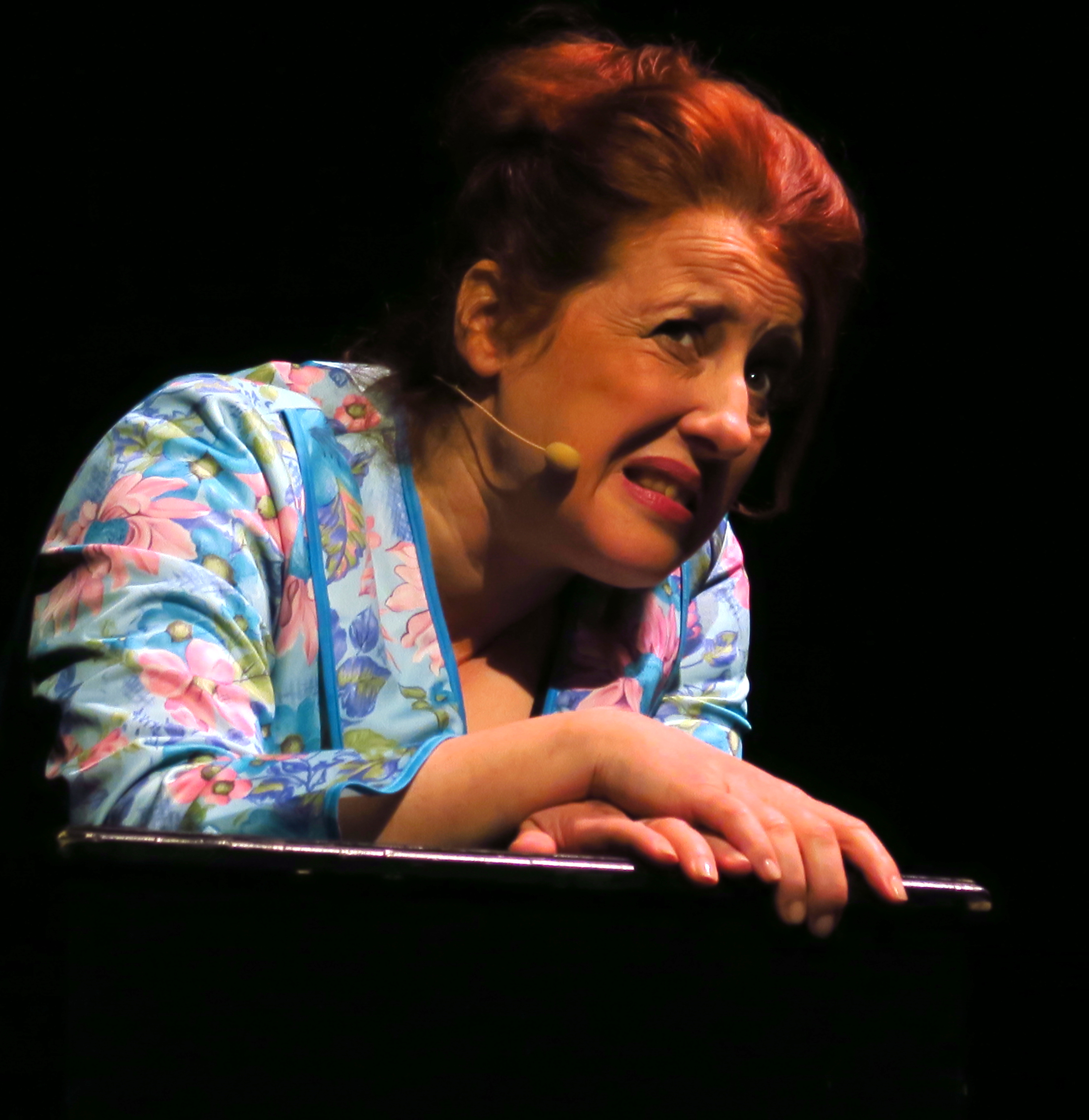 Die Kabarettistin Luise Kinseher als ihr Alter Ego "Mary from Bavary" bei der Verleihung des "Großen Karl-Valentin-Preises" an den Kabarettisten und Schauspieler Sigi Zimmerschied am 19. März 2017 im Münchner Volkstheater